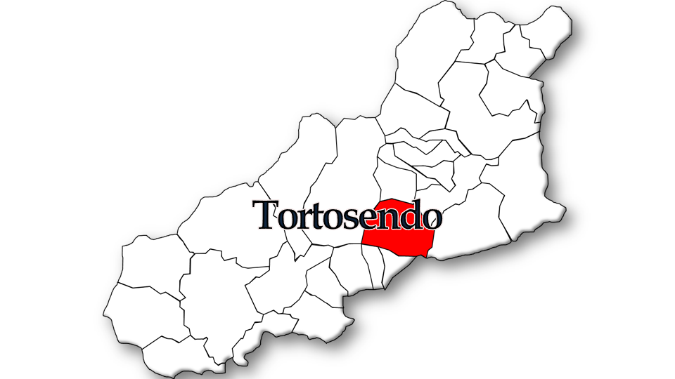 População